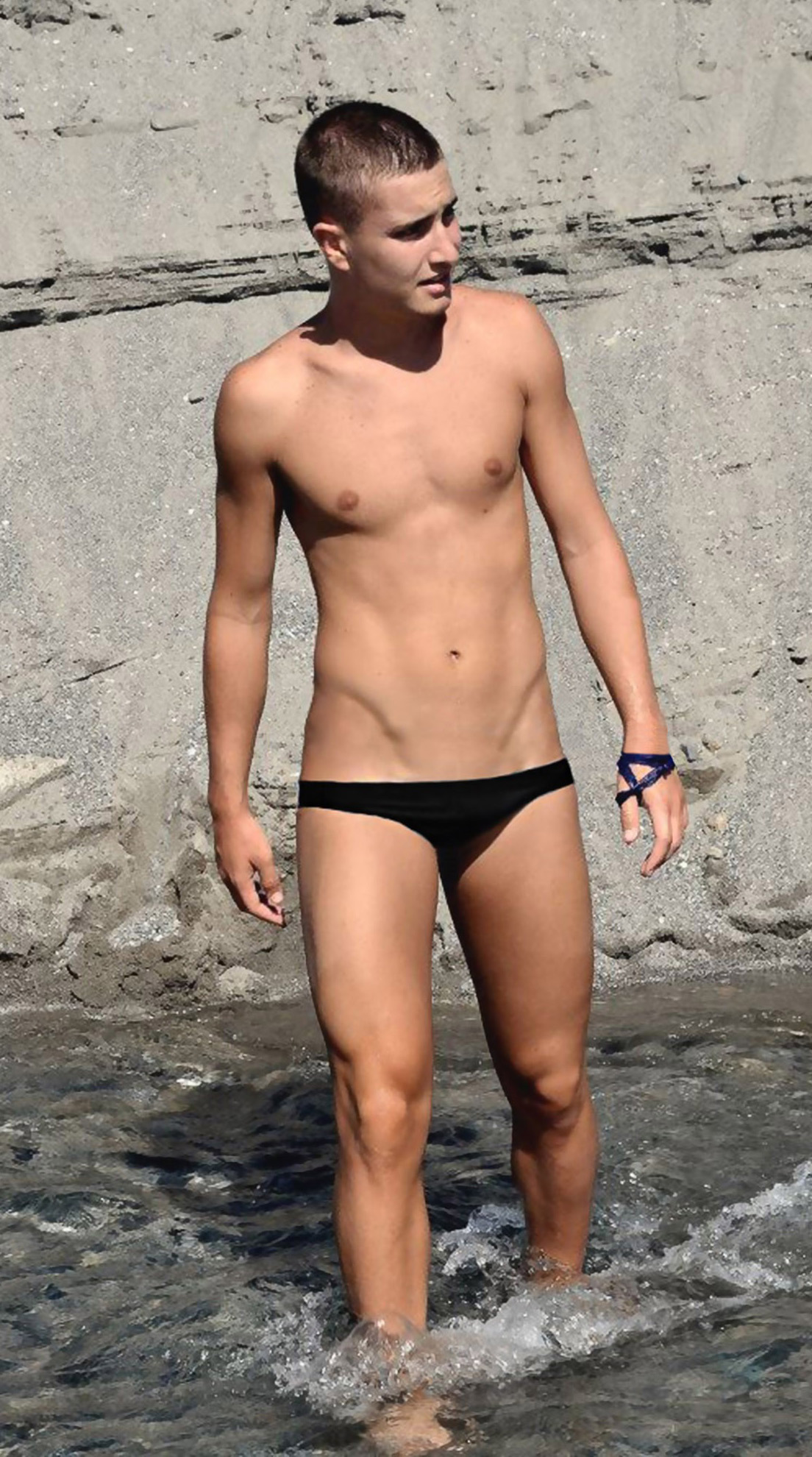 Uno slip da bagno "classico".